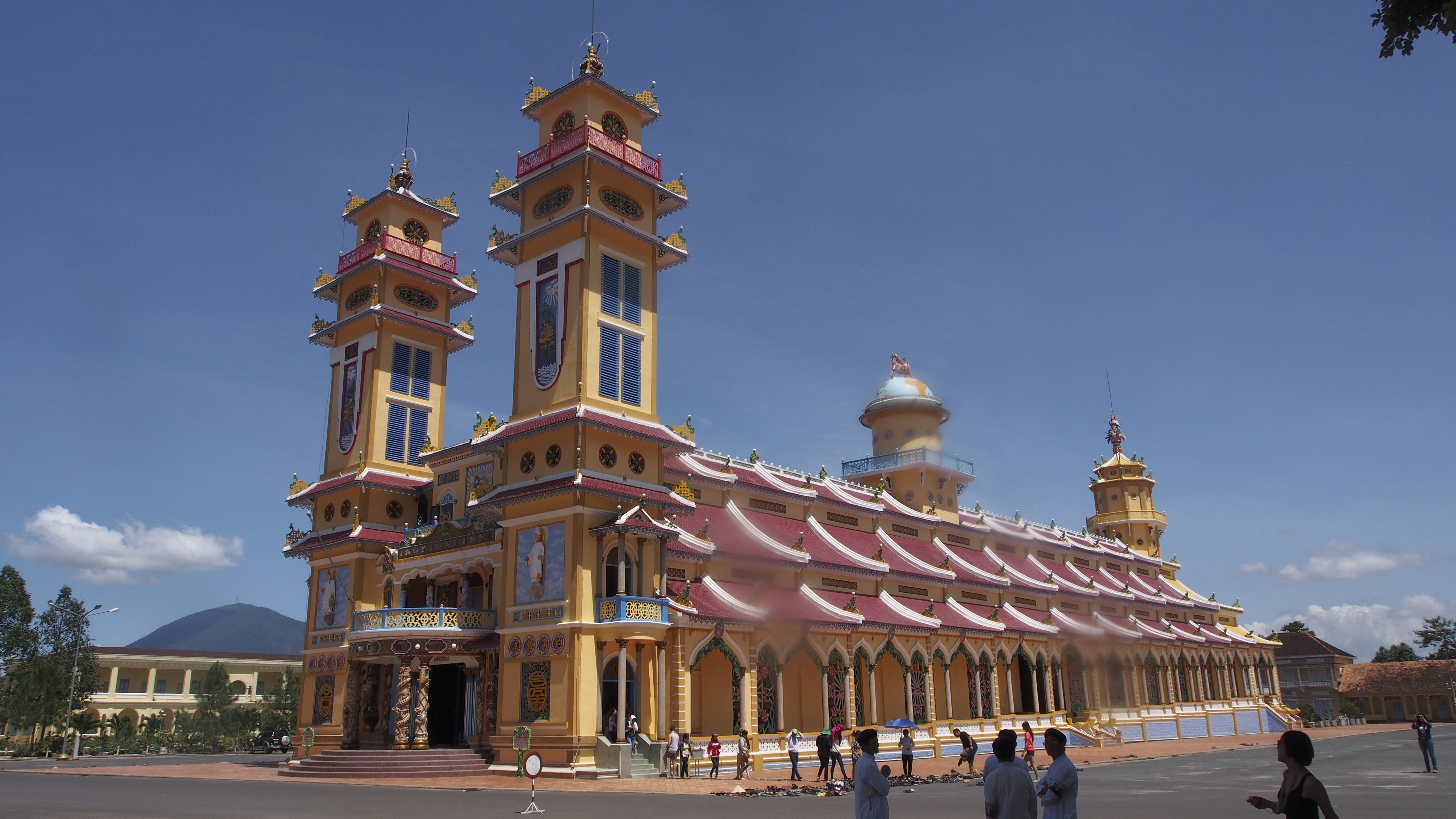 The Cao Đài Tây Ninh Holy See